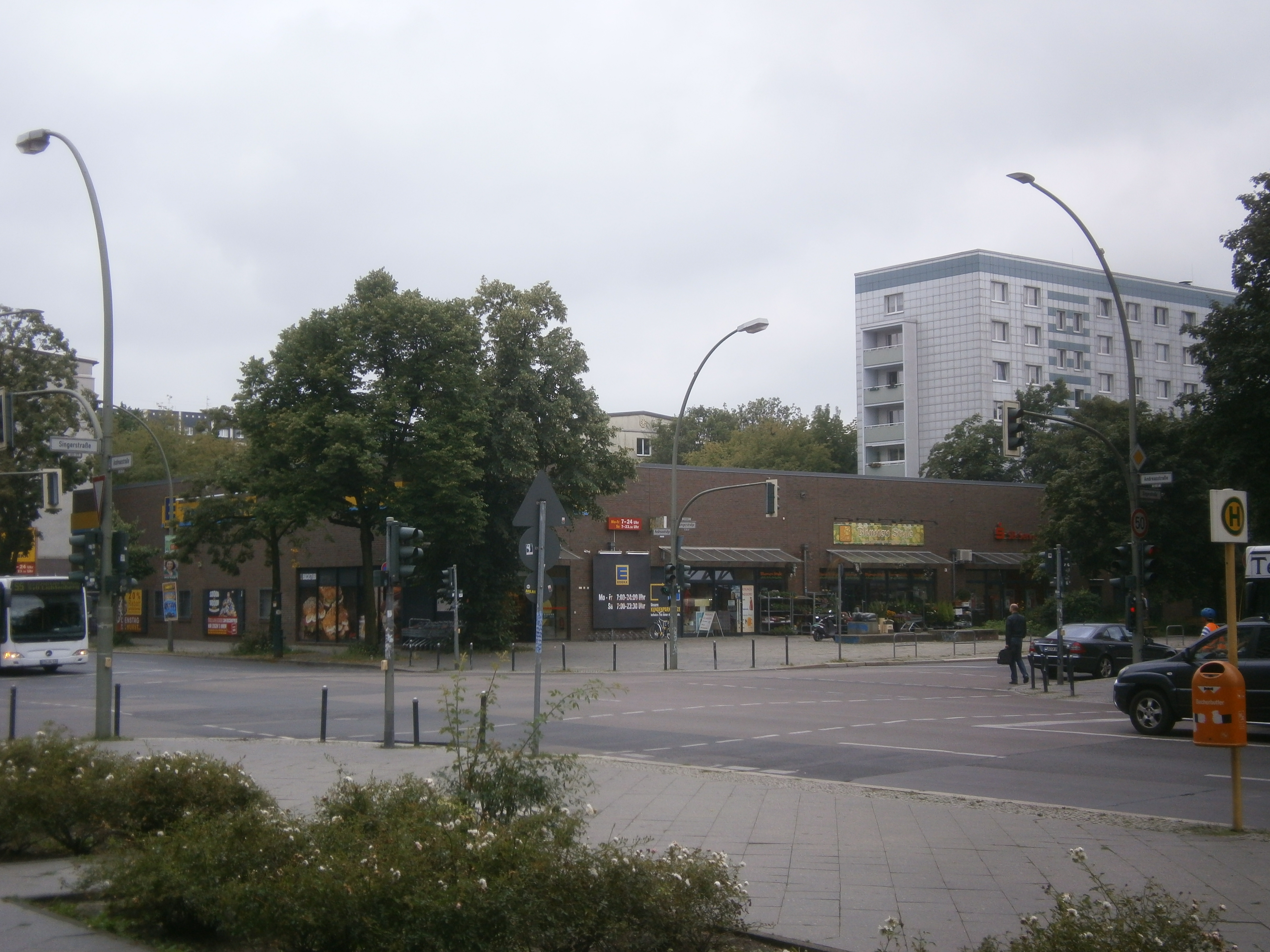 Die Andreasstraße ist eine Straße im Berliner Bezirk Friedrichshain-Kreuzberg, Ortsteil Friedrichshain. Angelegt wurde sie 1862 auf vorherigen Gartenland und 1863 benannt. Bis um 1900 waren die Grundstücke bebaut und bis 1930 wurde verdichtet. Bei Luftangriffen im Zweiten Weltkrieg wurde die Gebäude schwer getroffen. So ist die Straße seit den 1950er Jahren mit wiederhergestellten Altbauten, aber besondres durch Plattenbau-Wohnblöcke aber seit 1990 auch durch Hotel- und Bürobauten im Umfeld des Ostbahnhofs charakterieisiert. Das Bild zeigt: Andreasstraße 59: Supermarkt der 2000er Jahre, der die Kaufhalle von 1960 - Singerstraße 29 - ersetzt und auf dem aufgelassenen eingezogenen Andreasplatz steht.